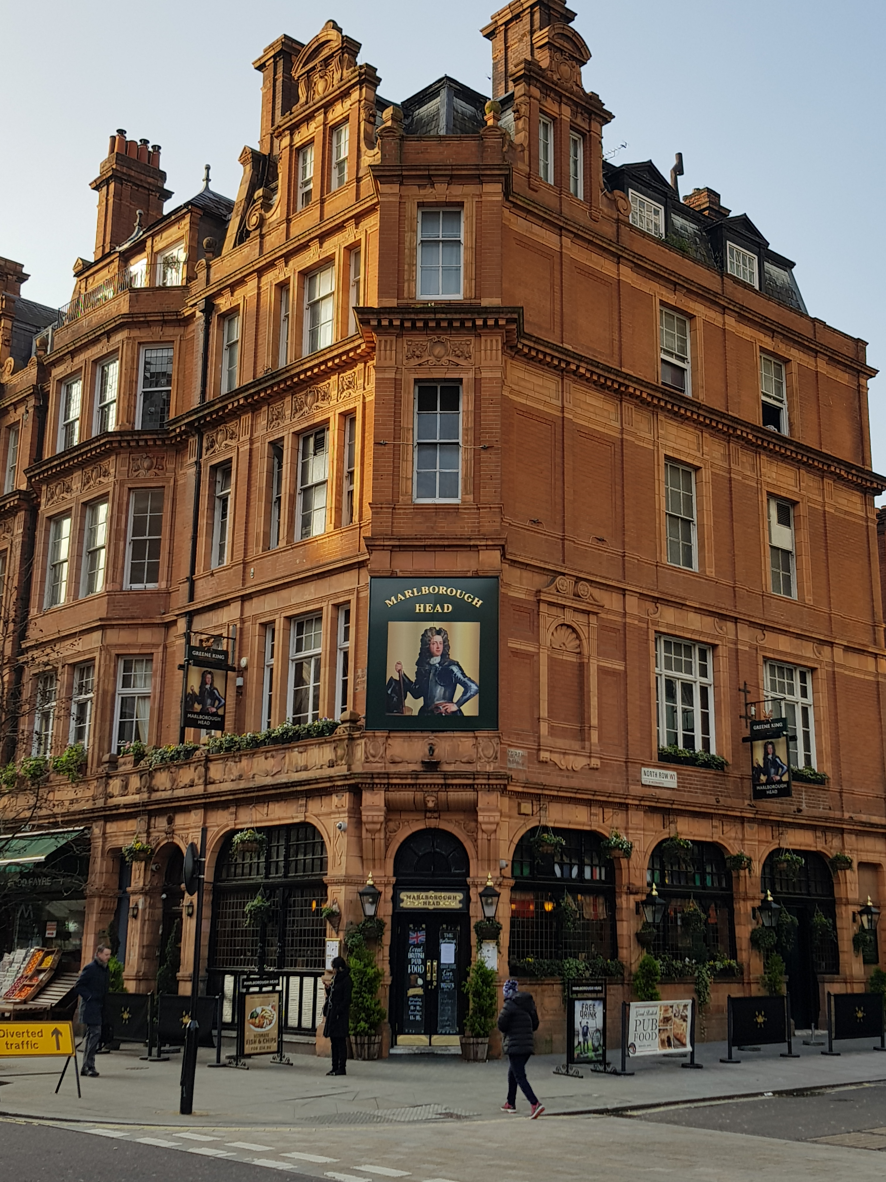 Pub "The Marlborough Head", 24 North Audley Street, Londres.